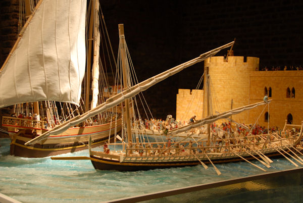 Modell Hafen von Akkon in 1:25